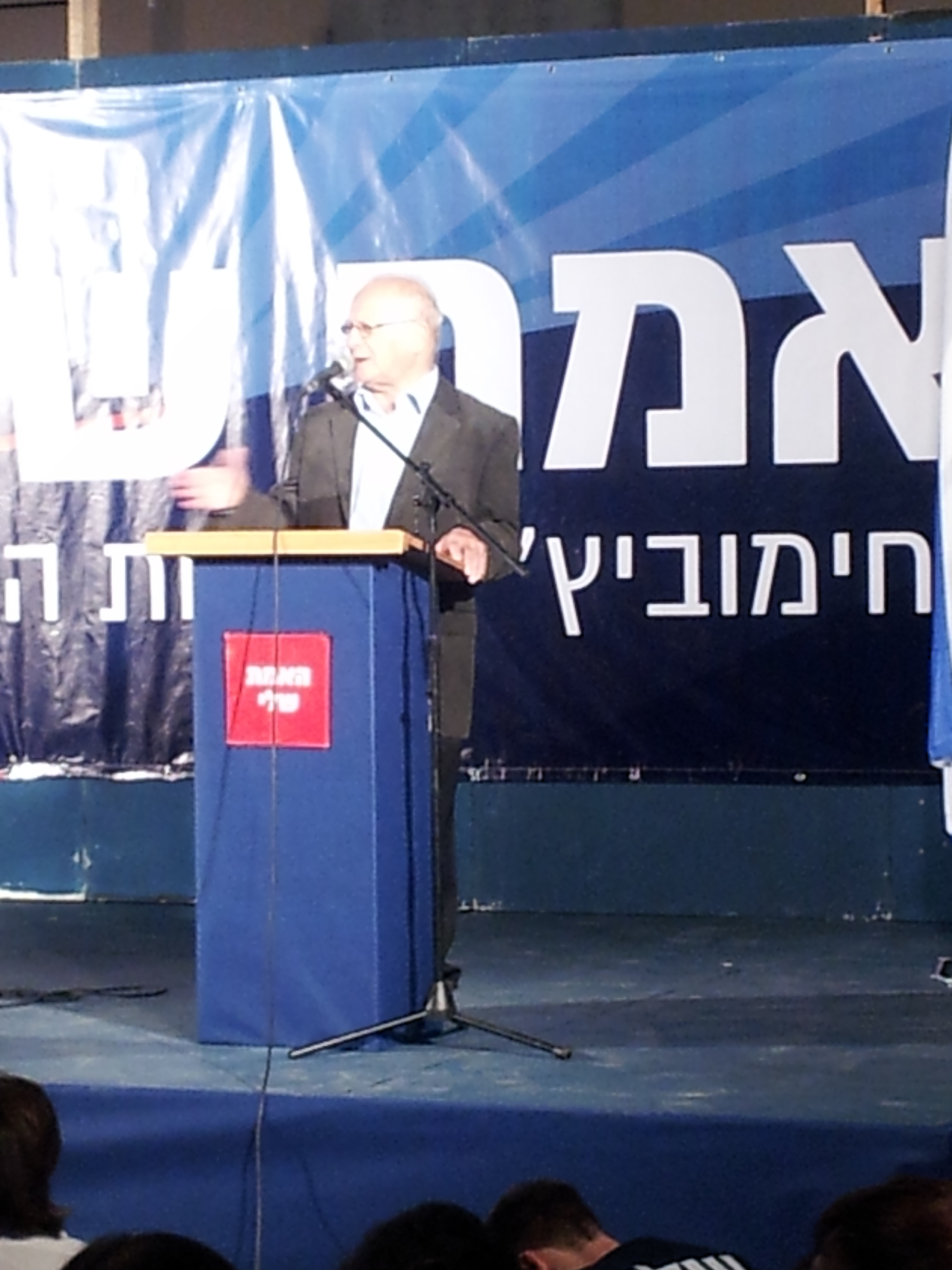 מיכה חריש,2013